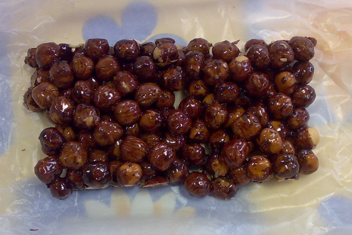 Fotografia di croccante alle nocciole